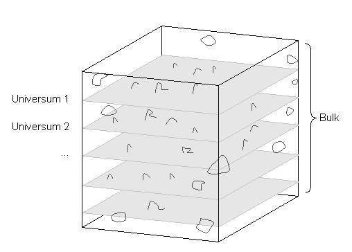 Bulk